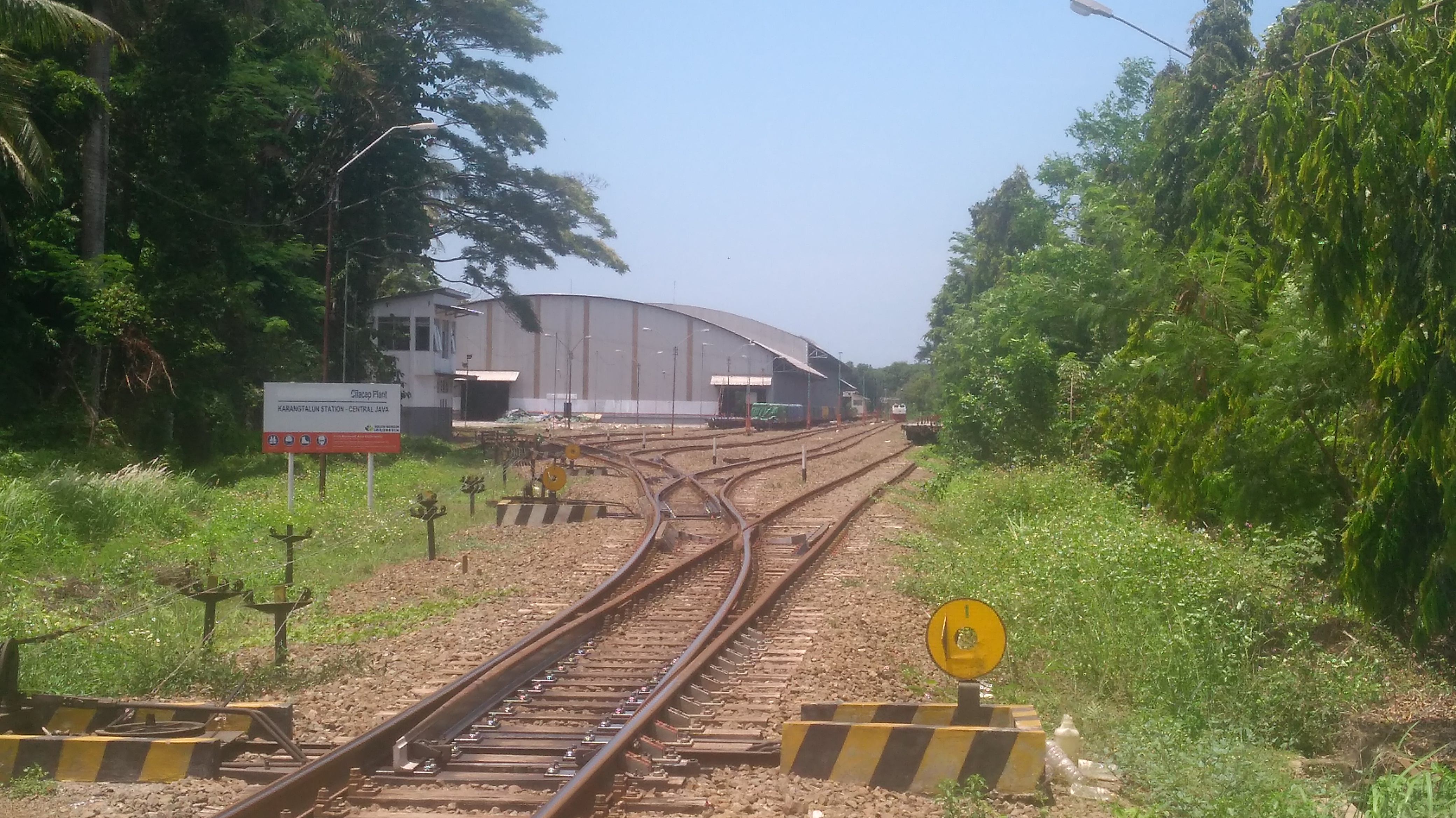 Tampak emplasemen dari Stasiun Karangtalun